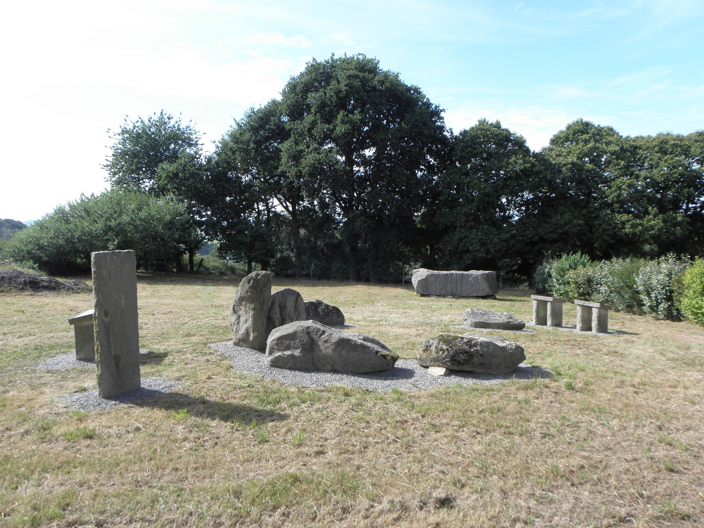 Hemicycle mégalithique dit Les Tombes, sis commune de Saint-Broladre (35).